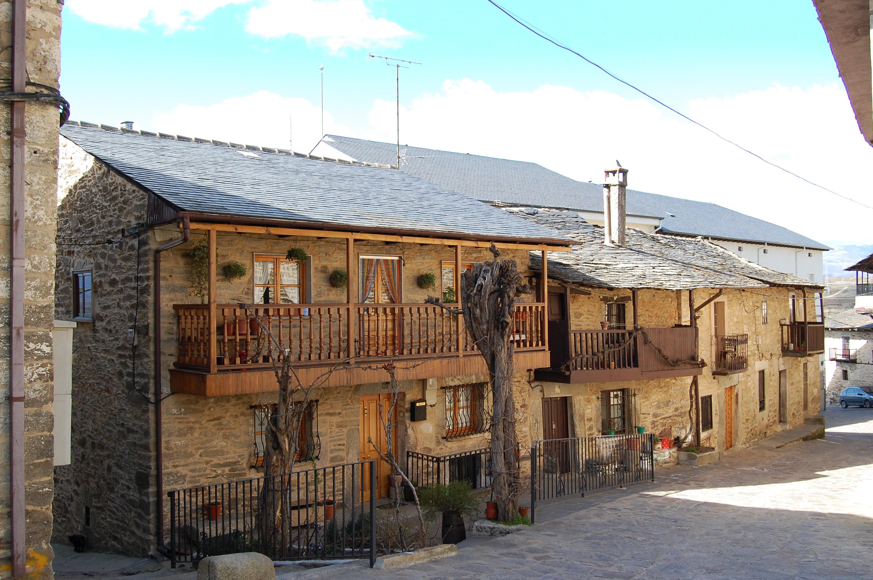 Puebla de Sanabria (Póvoa de Seabra), província de Zamora, Espanha.